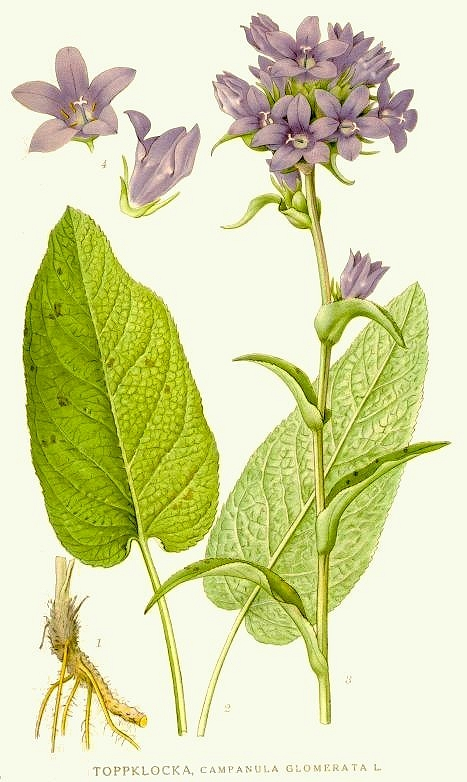 Original Description Toppklocka, Campanula glomerata L. (cleaned)